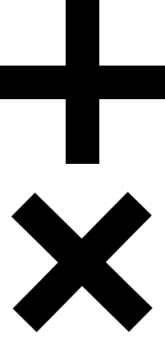 Due croci, prese da es.wiki (senza indicazioni di copyright)